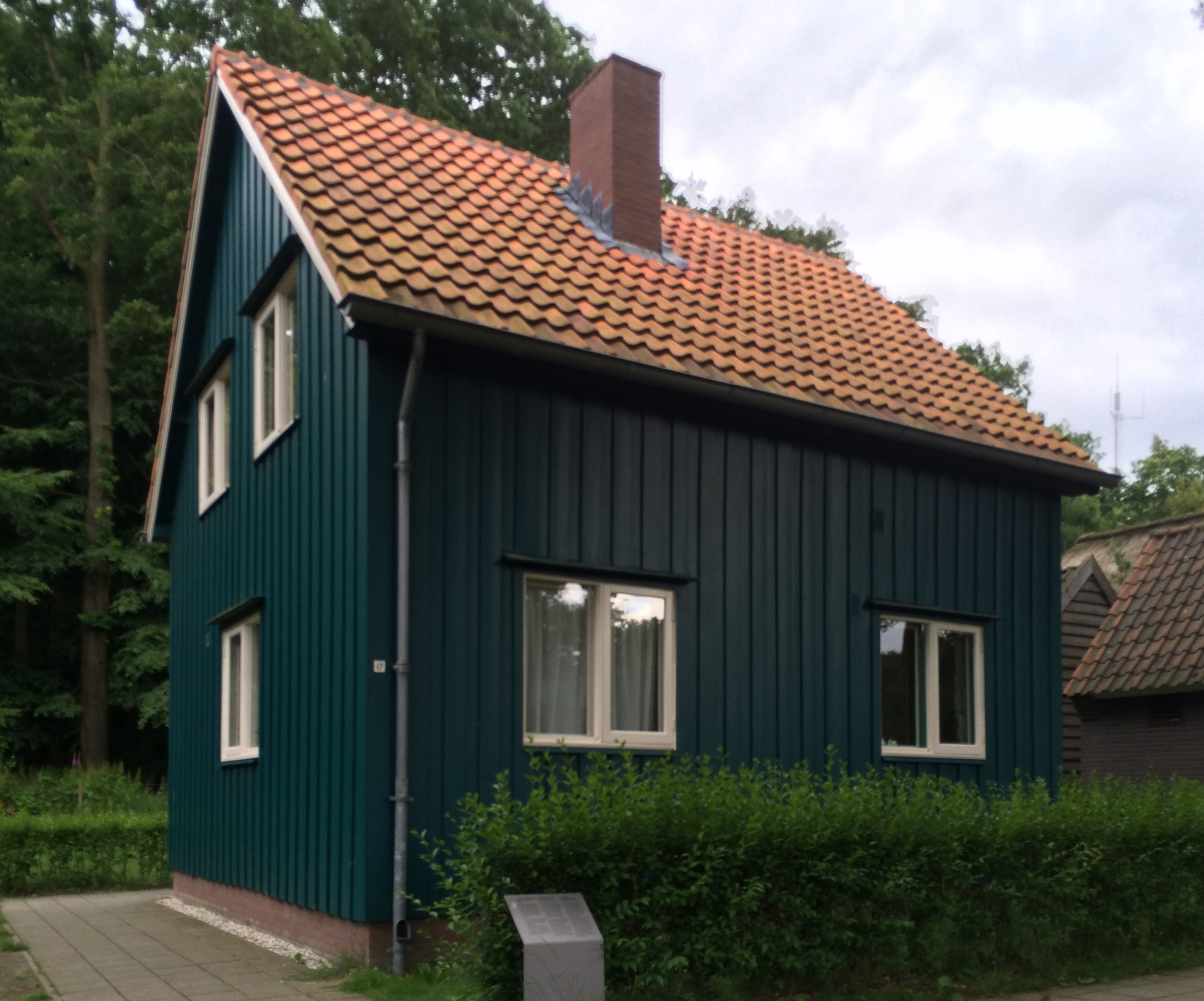 Nederlands Openluchtmuseum tijdens rondleiding 15e verjaardag van Wikipedia NL